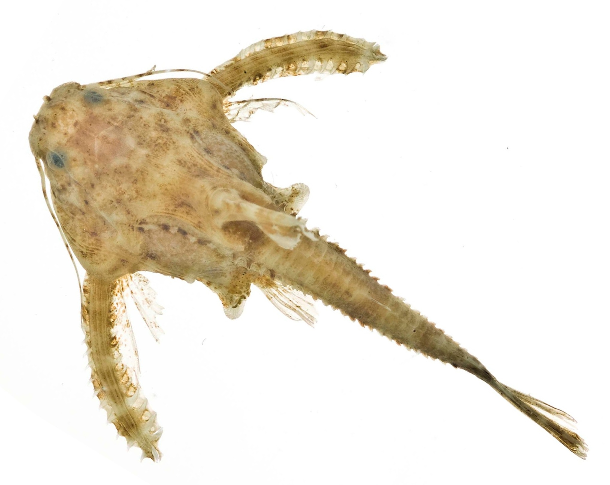 Physopyxis lyra